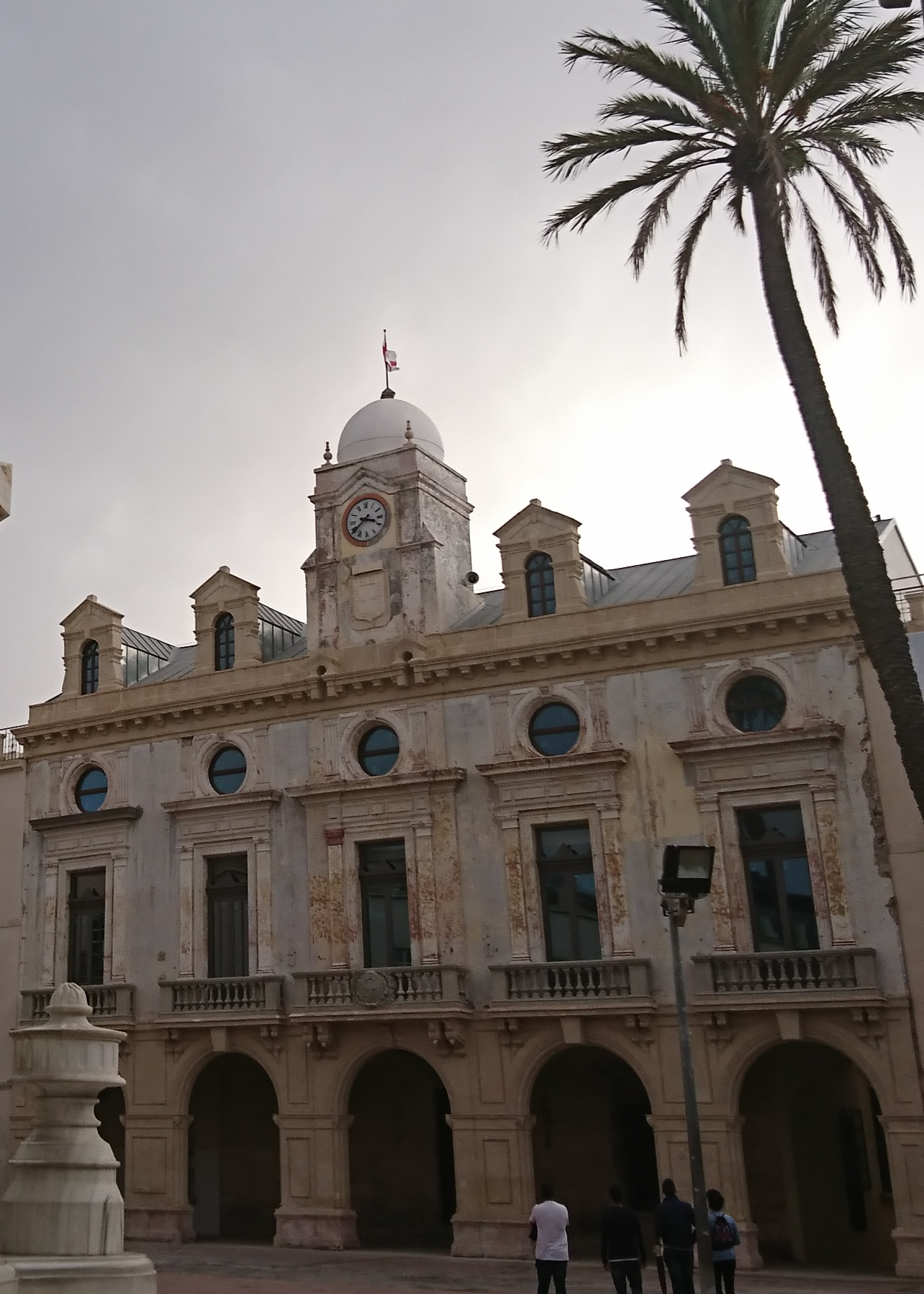 Plaza Constitución Almería